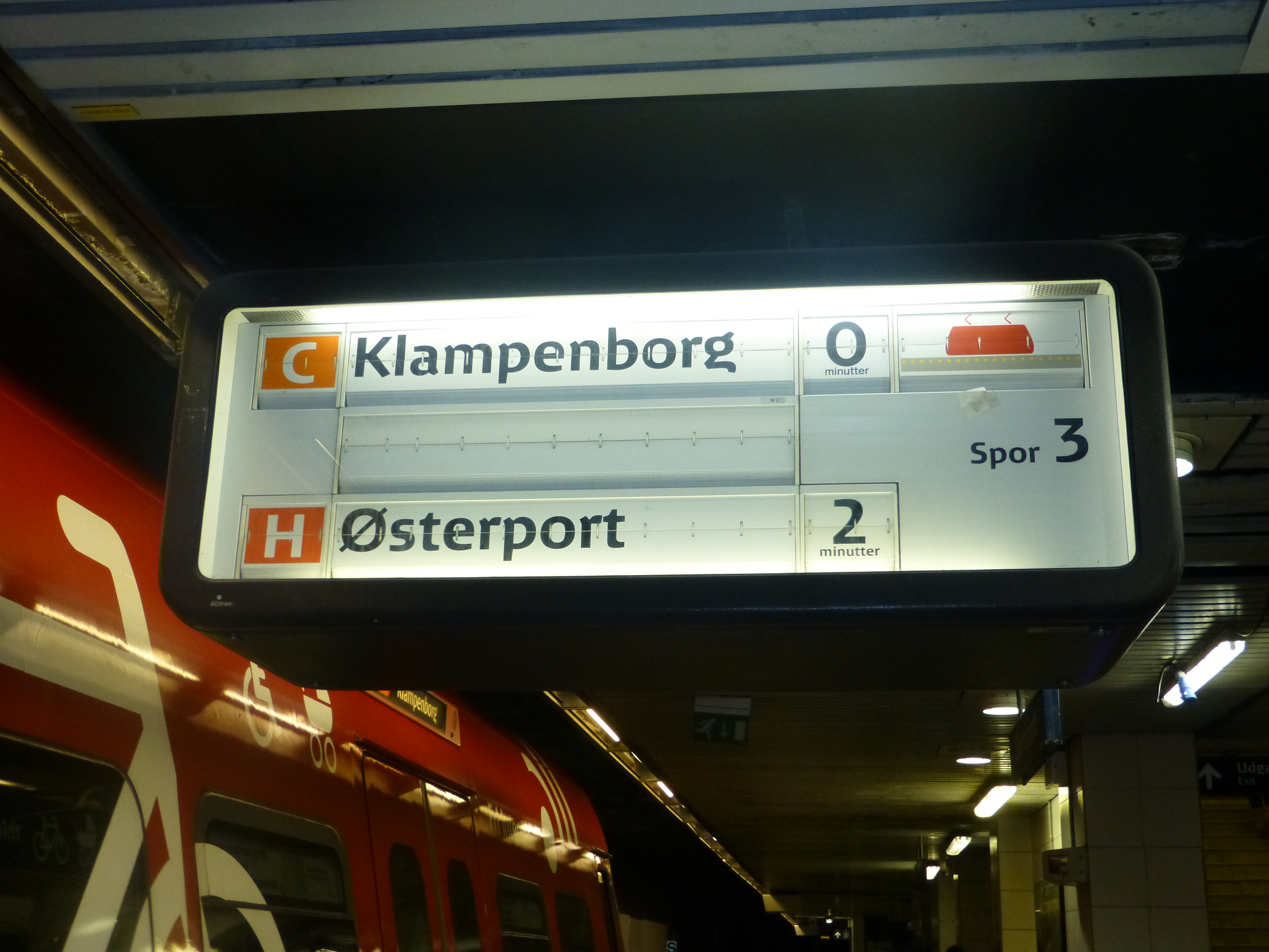 Split-flap display at Nørreport Station, Copenhagen. Line C for Klampenborg and line H for Østerport.